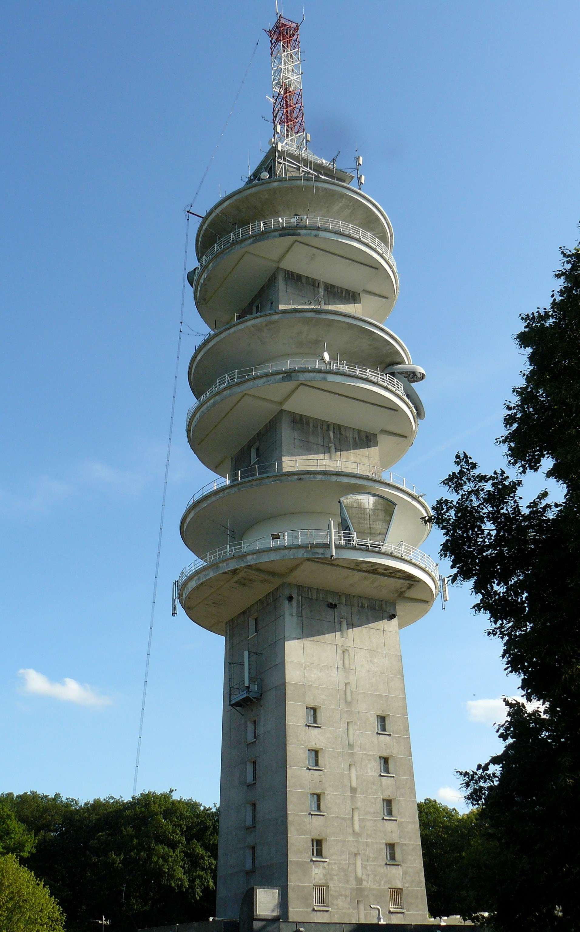 La tour hertzienne de Meudon (forêt de Meudon, Hauts-de-Seine, France)